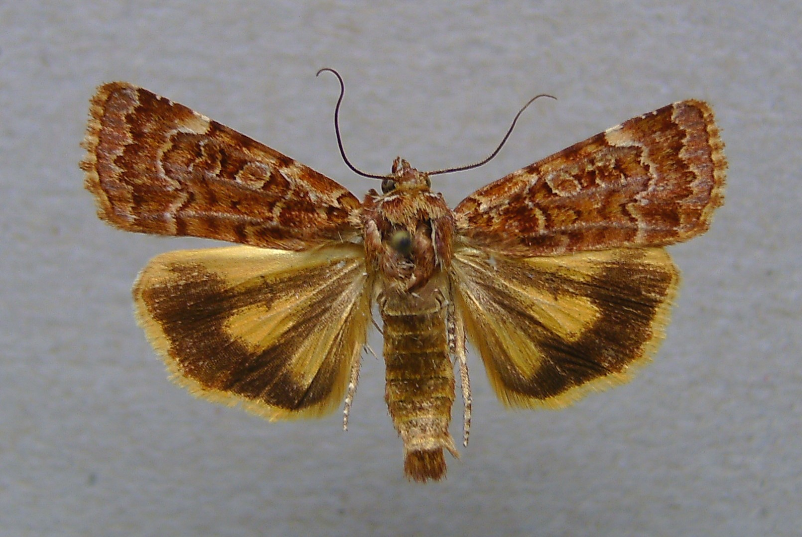 Divaena haywardi, Krim